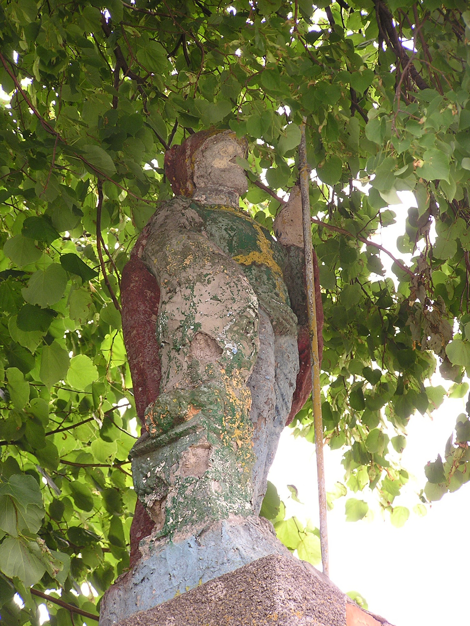 Пам'ятний знак св. Флоріану, село Коцюбинчики, центр